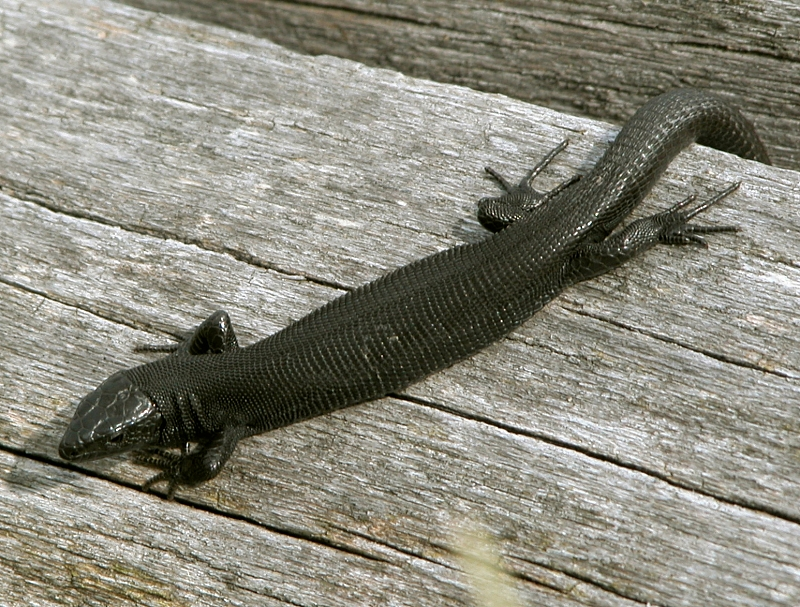 Zootoca vivipara (melanic), Waldeidechse, Feldberg, Taunus, Hessen, Deutschland, Germany